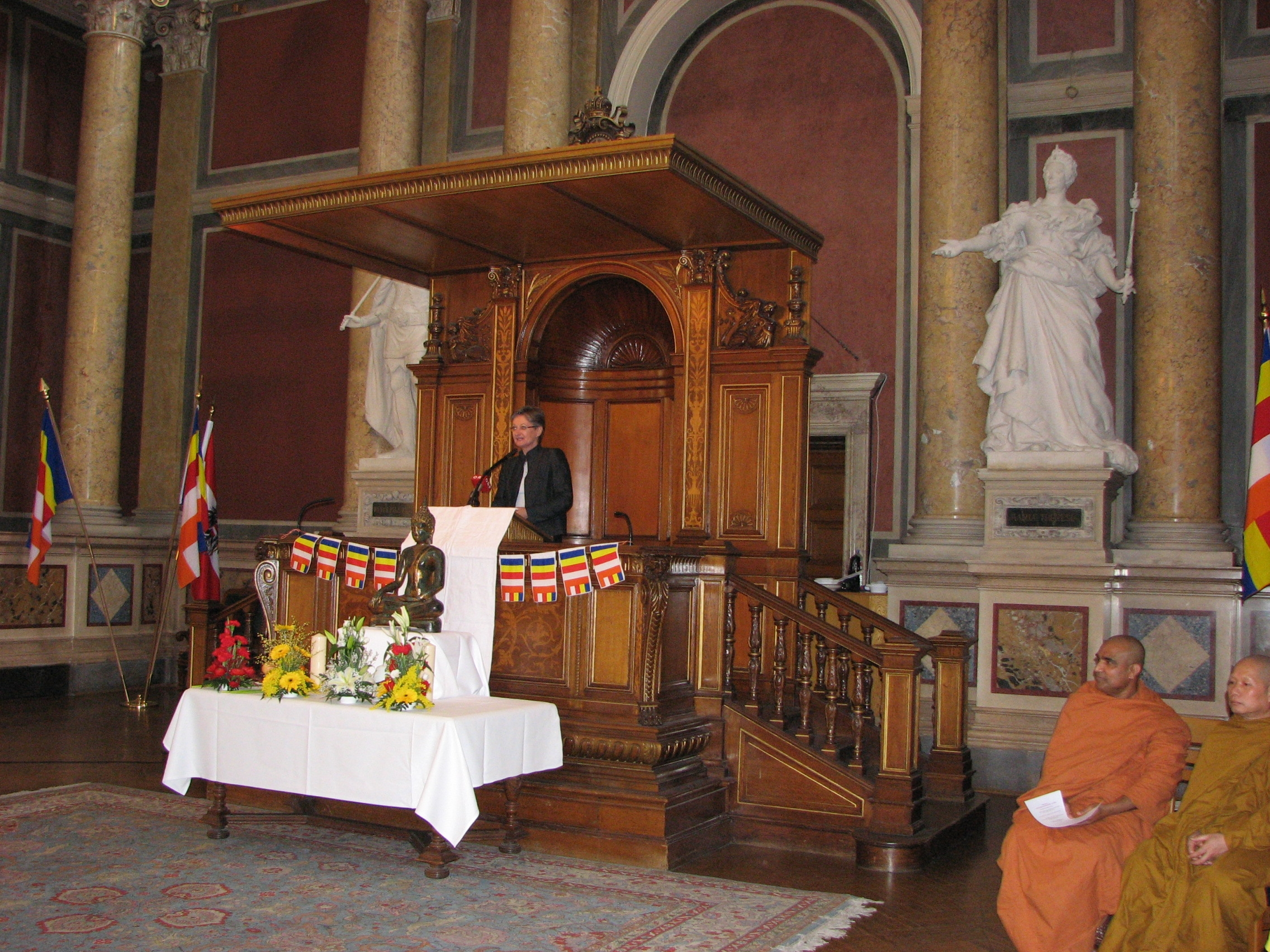 Bundesministerin Schmied beim Festakt "25 Jahre staatliche Anerkennung des Buddhismus in Österreich"